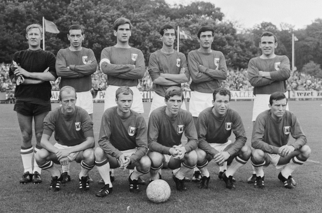 Beschrijving Het elftal van AZ 67. Staand vlnr Schouten, Visser, v. Veen, Molenaar, Racic, Hersche, zittend vlnr Twisk, Tijm, Dekker, v. Eikeren, v. Rijssel